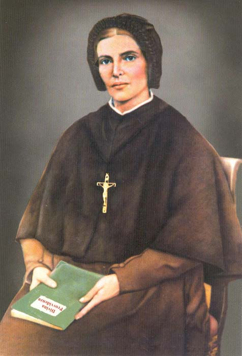 Beata Chiara Bosatta